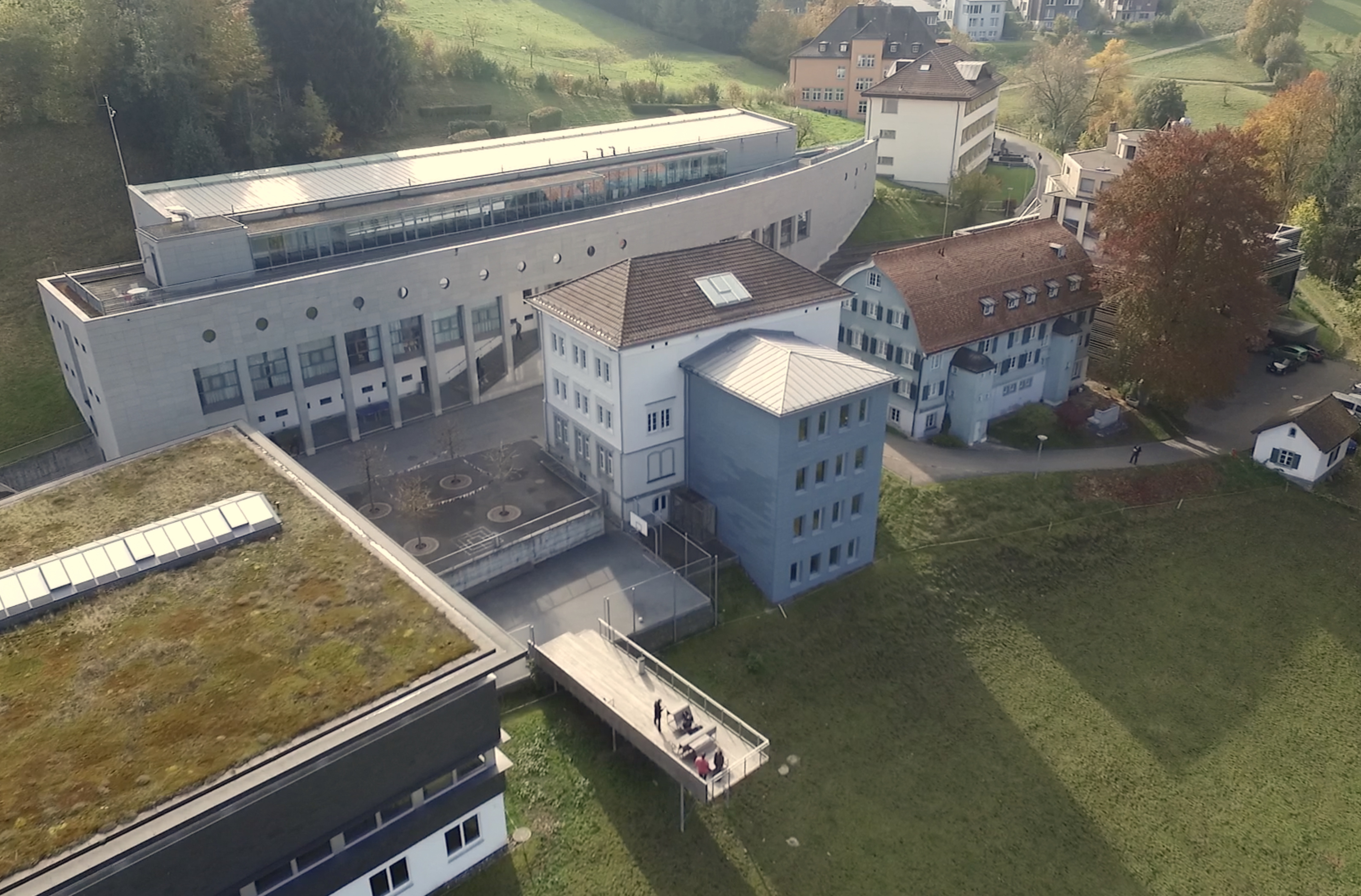 Areal der Kantonsschule Trogen (Luftaufnahme Drohne). Unten V. l.n.r.: Aula, Ueli-Prager-Platz, Altes Schulhaus, Altes Konvikt, Mensa-Gebäude. Oben V. l.n.r.: Arche, Annex, Rotes Schulhaus